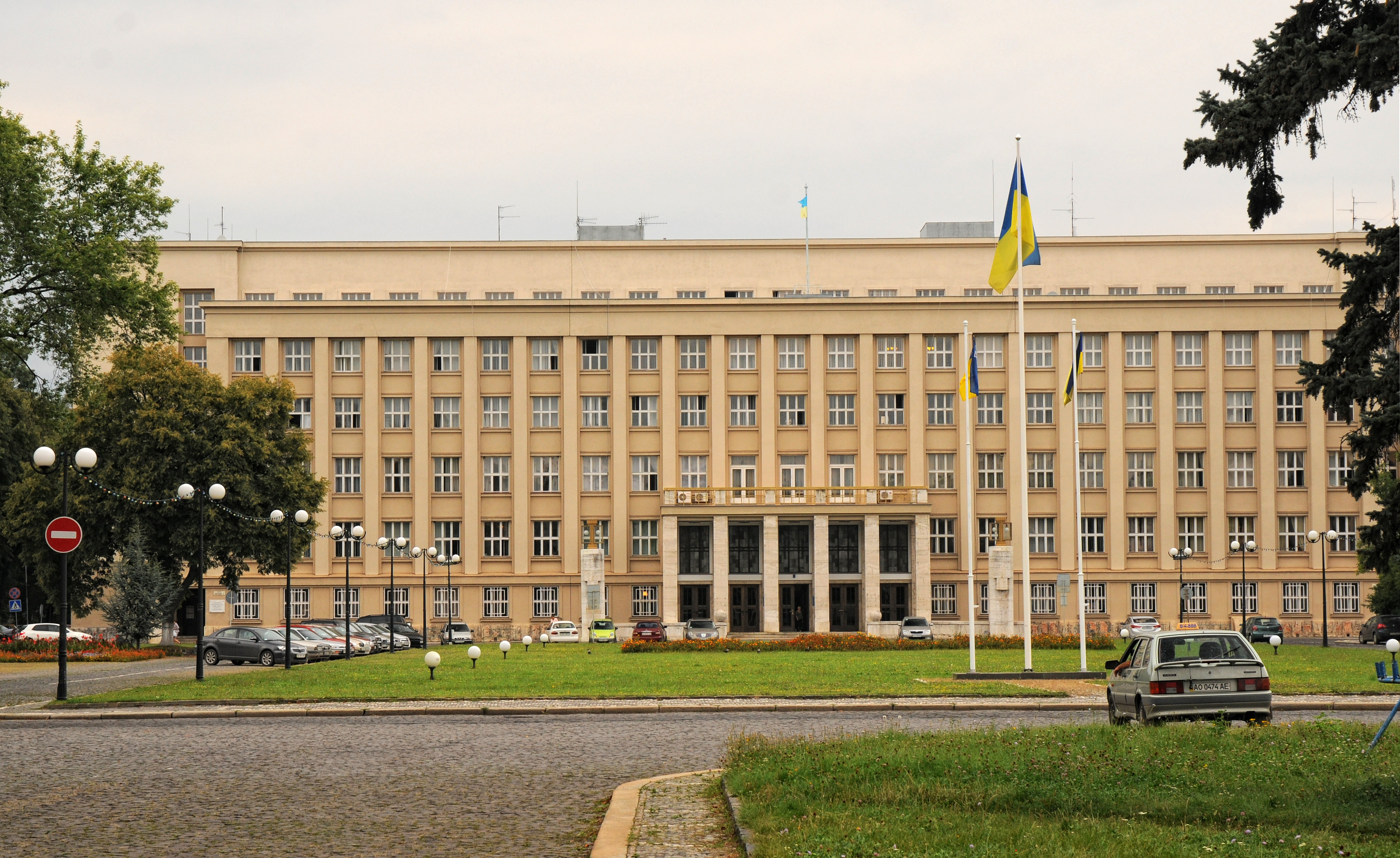 Облдержадміністрація